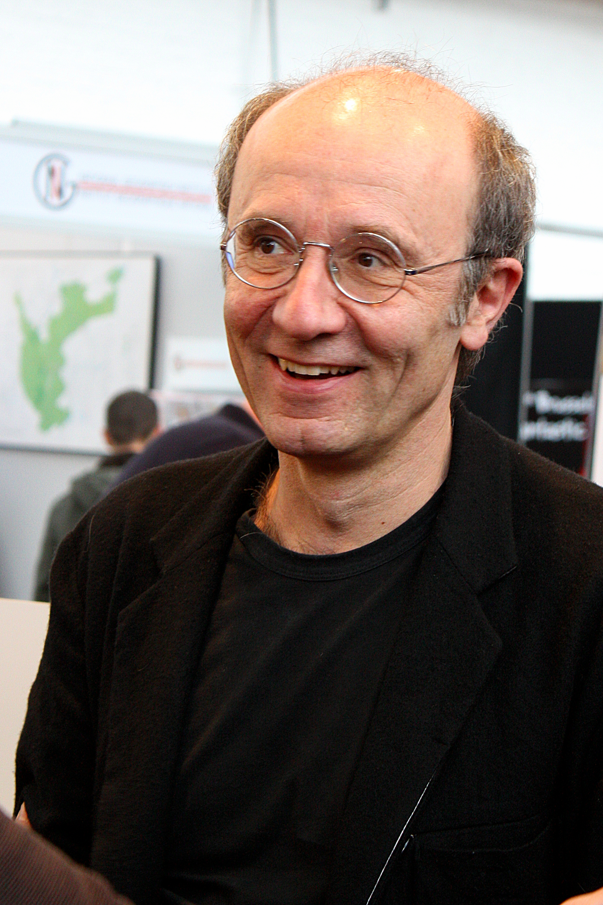 Philippe Geluck sortant d'une séance de dédicace lors de l'édition 2010 de la Foire du Livre de Bruxelles.